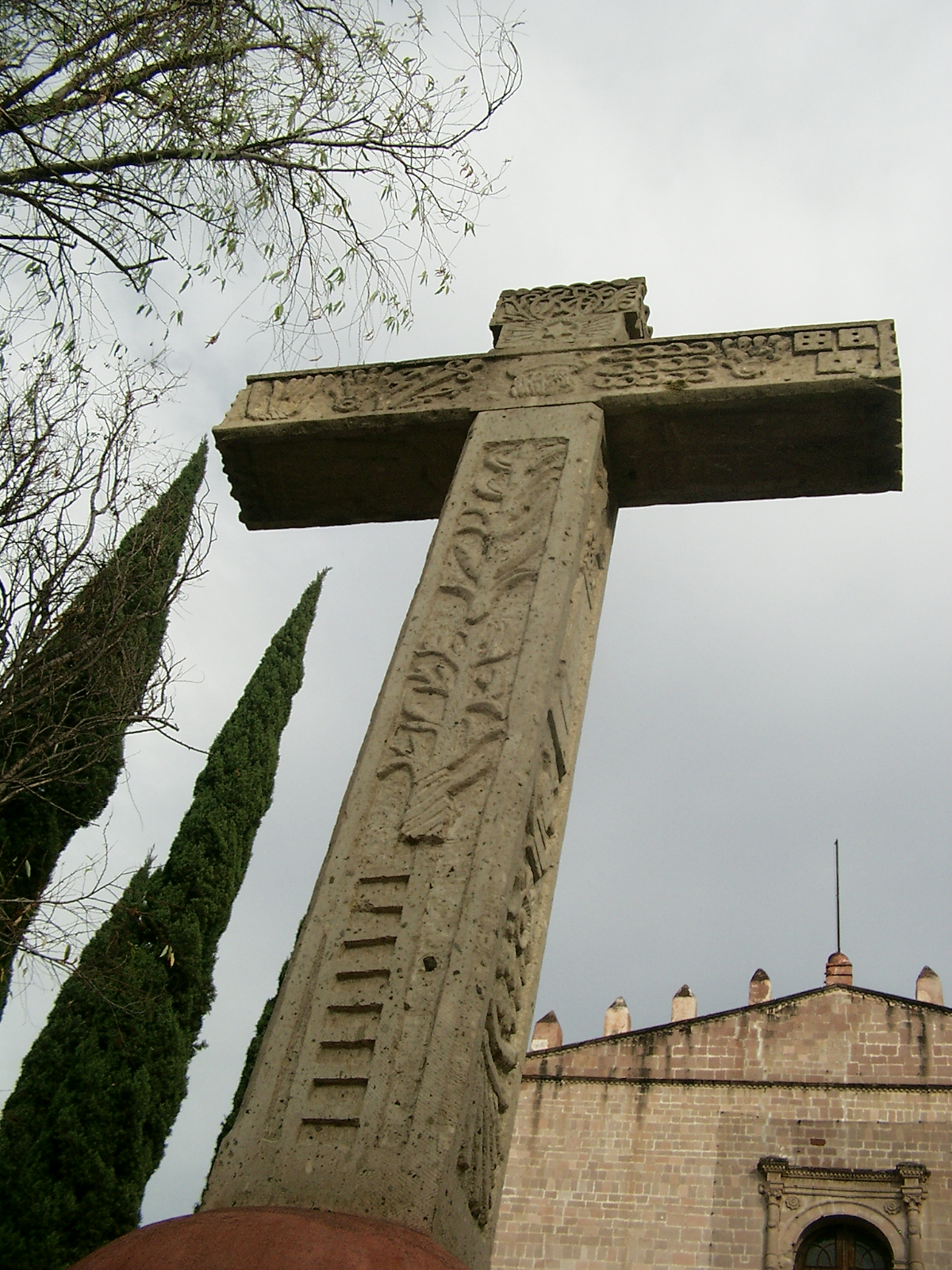 Cruz atrial de Actopan, Hidalgo, México